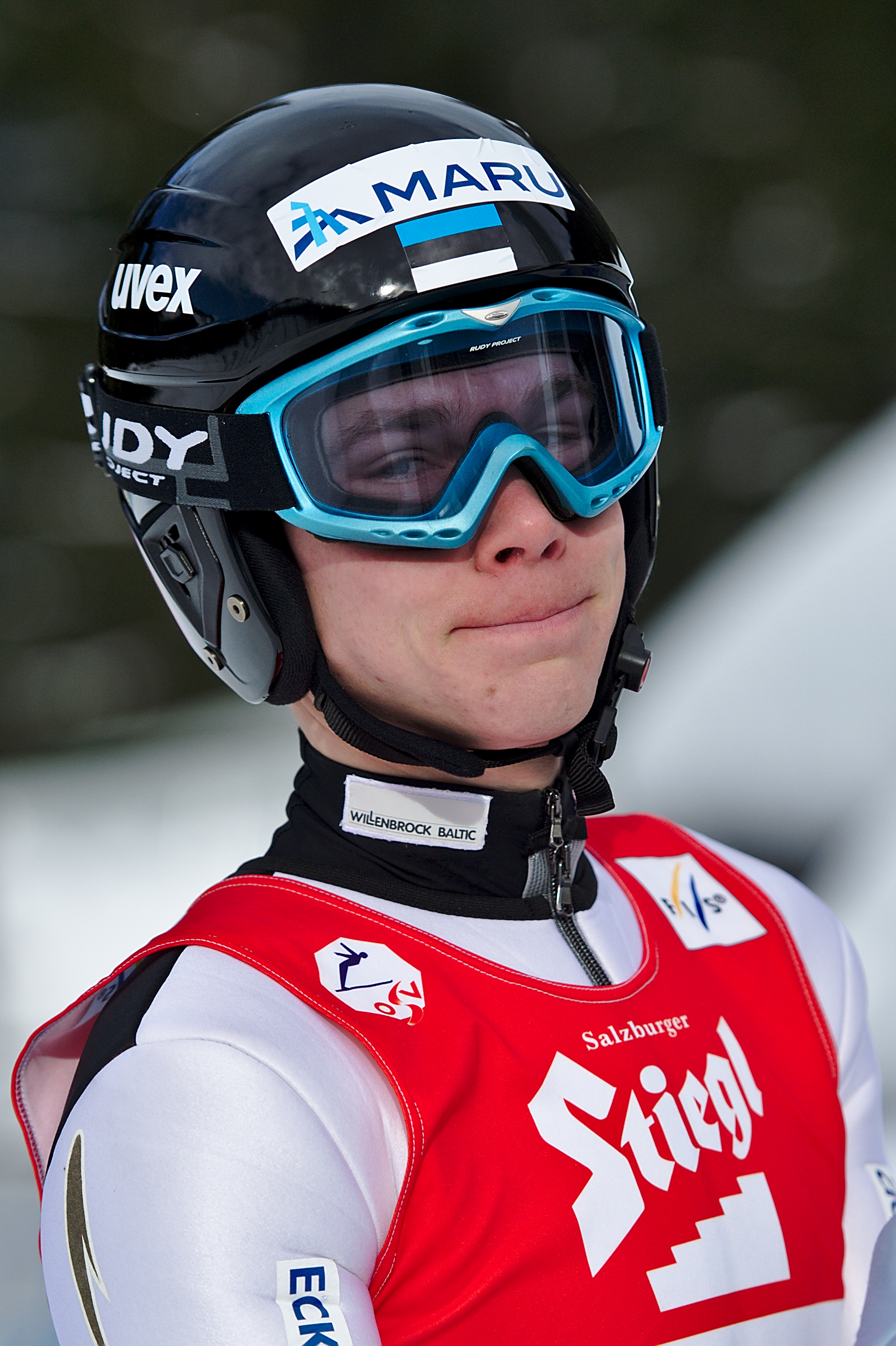 Kail Piho in Eisenerz 2017